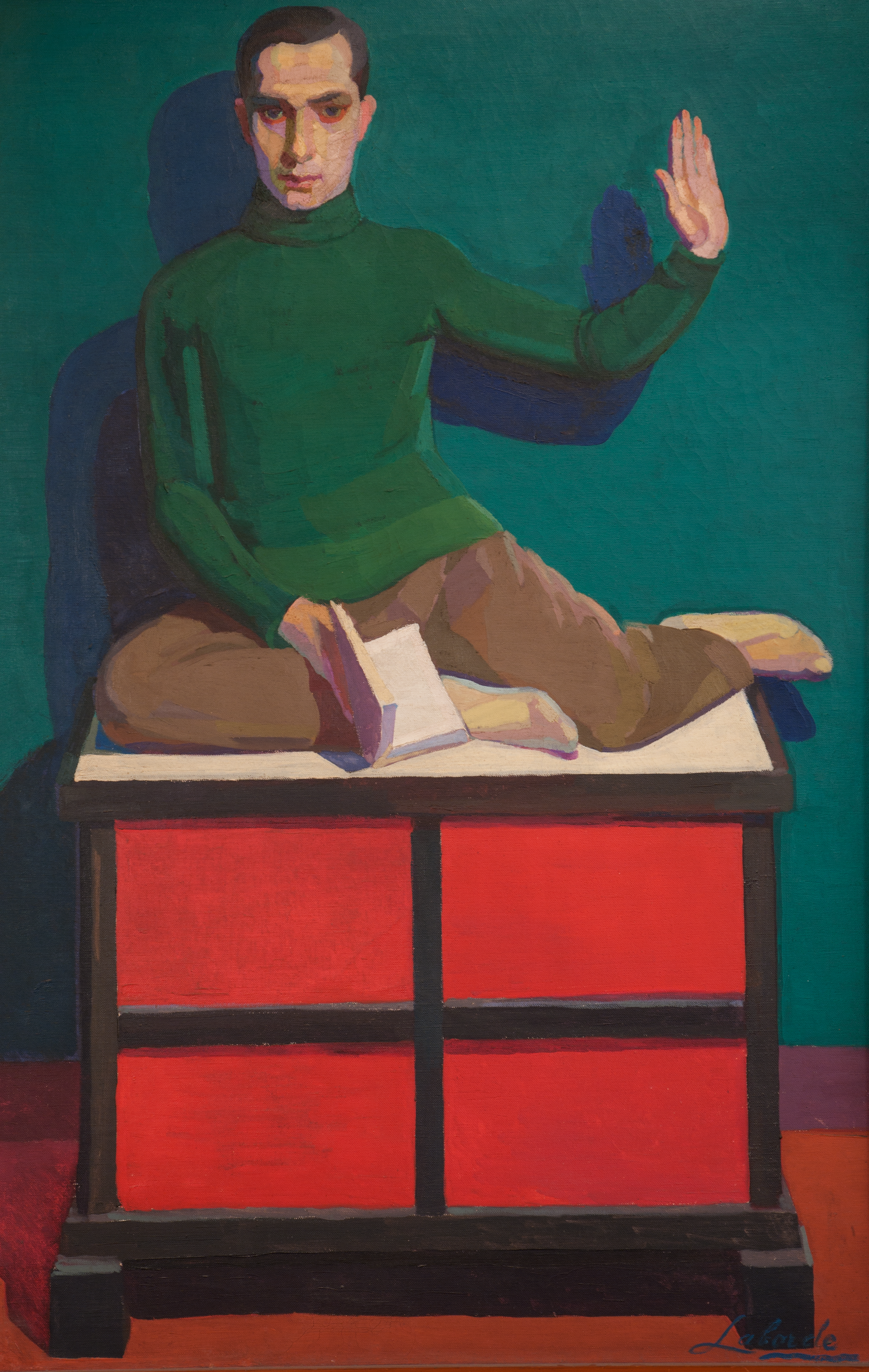 Obra "Retrato de Luis E. Pombo" del pintor uruguayo Guillermo Laborde. Óleo sobre tela de 169 cm. de alto x 110 cm. de ancho. Fotografía de la obra tomada por Eduardo Baldizan.